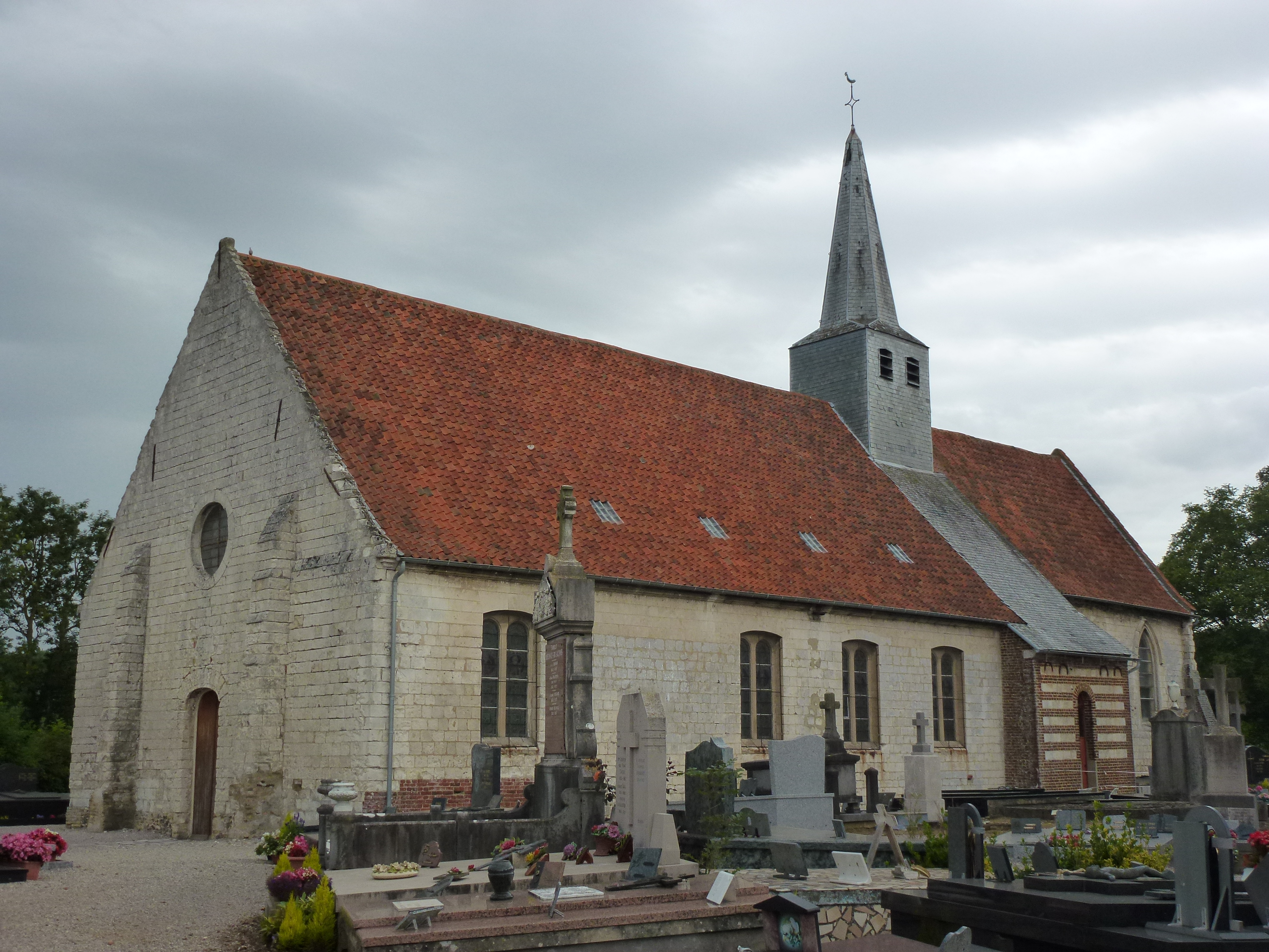 Église Saint-Pierre de Nielles-lès-Ardres (Inscrit) .